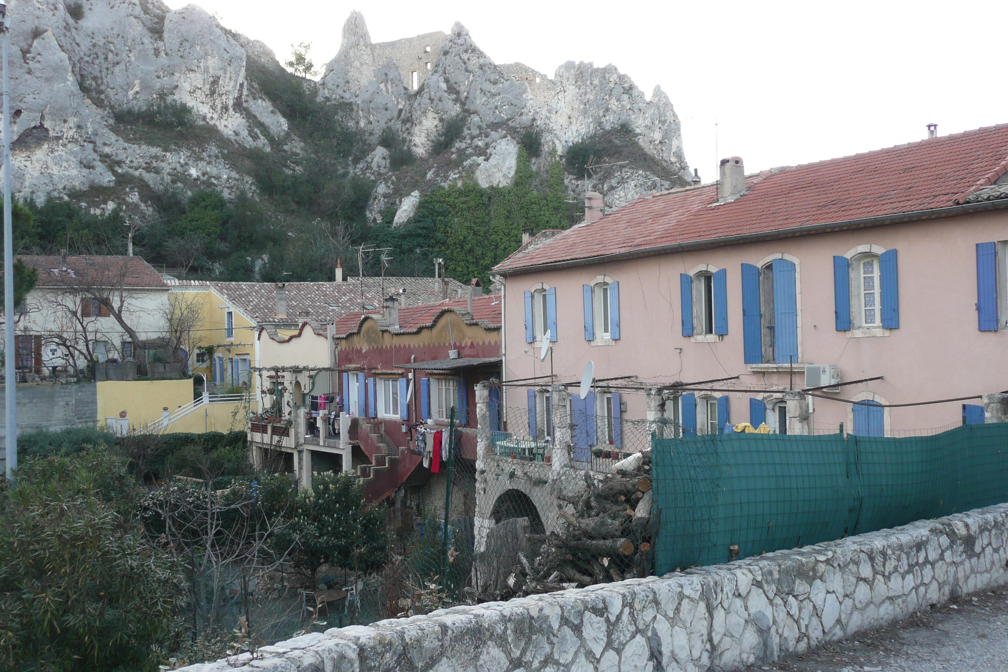 Orgon.